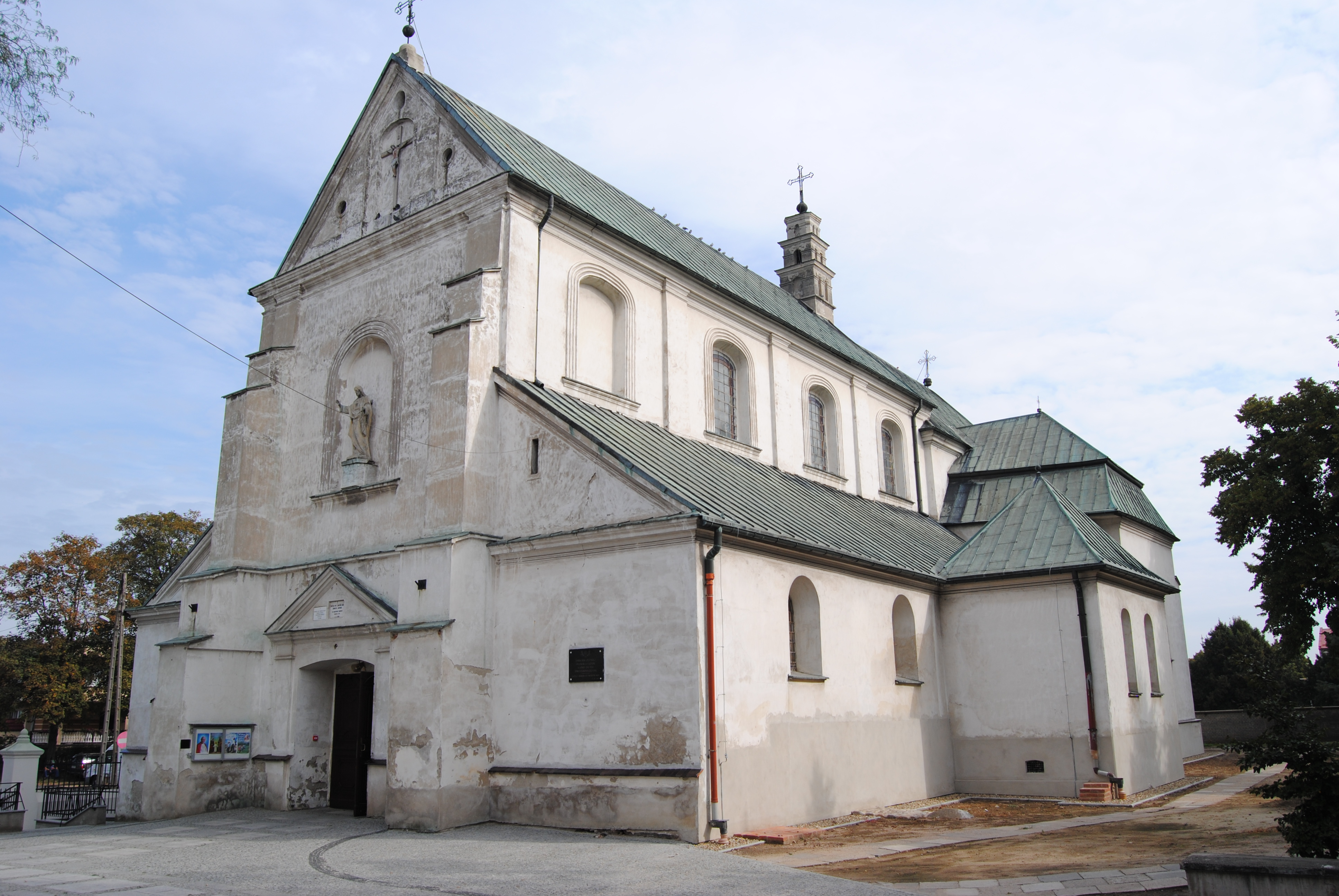 Łęczyca, kościół par. p.w. św. Andrzeja, XV, XVII, XIX